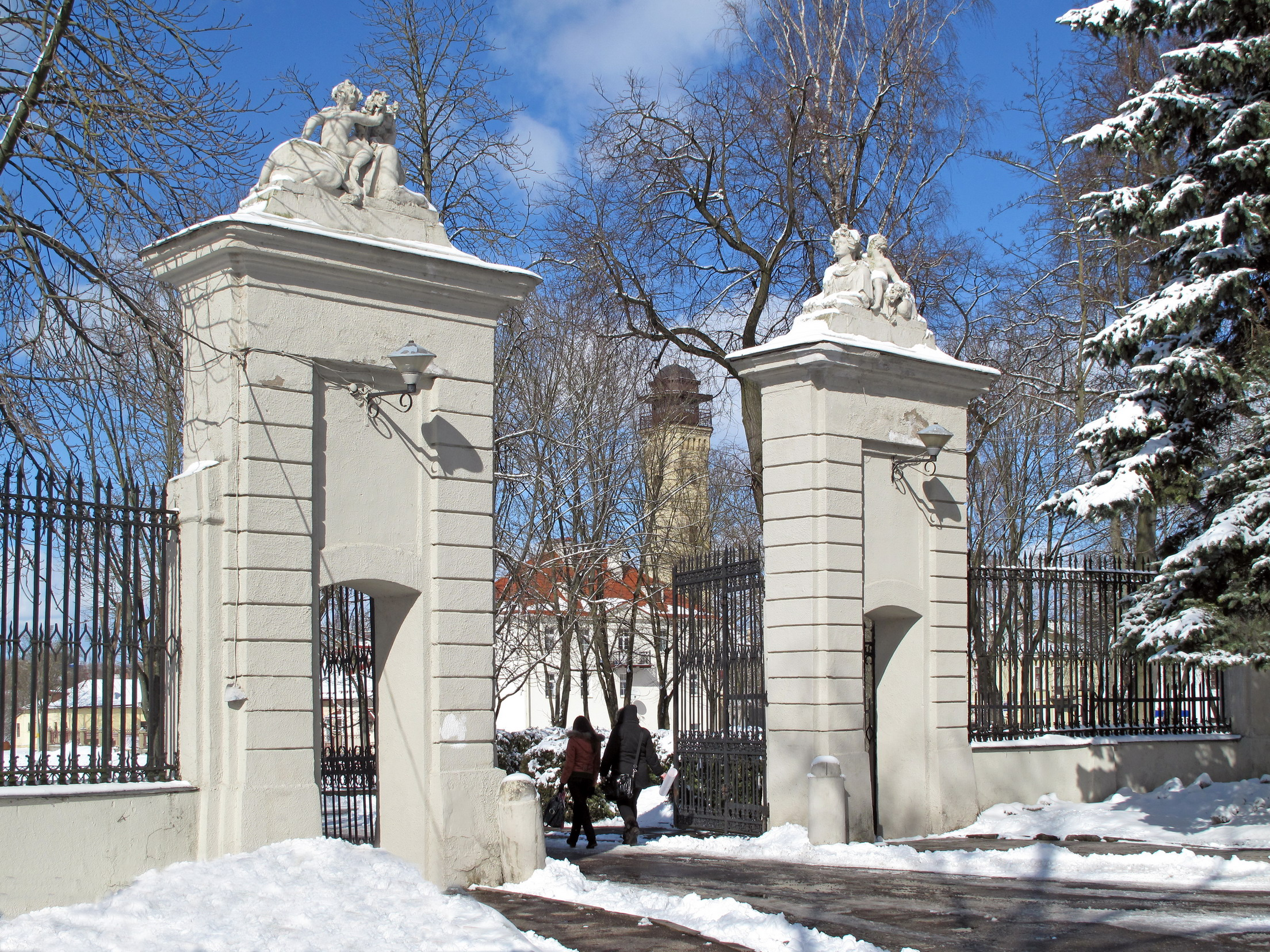 Беларуская (тарашкевіца): Вх ворота замка